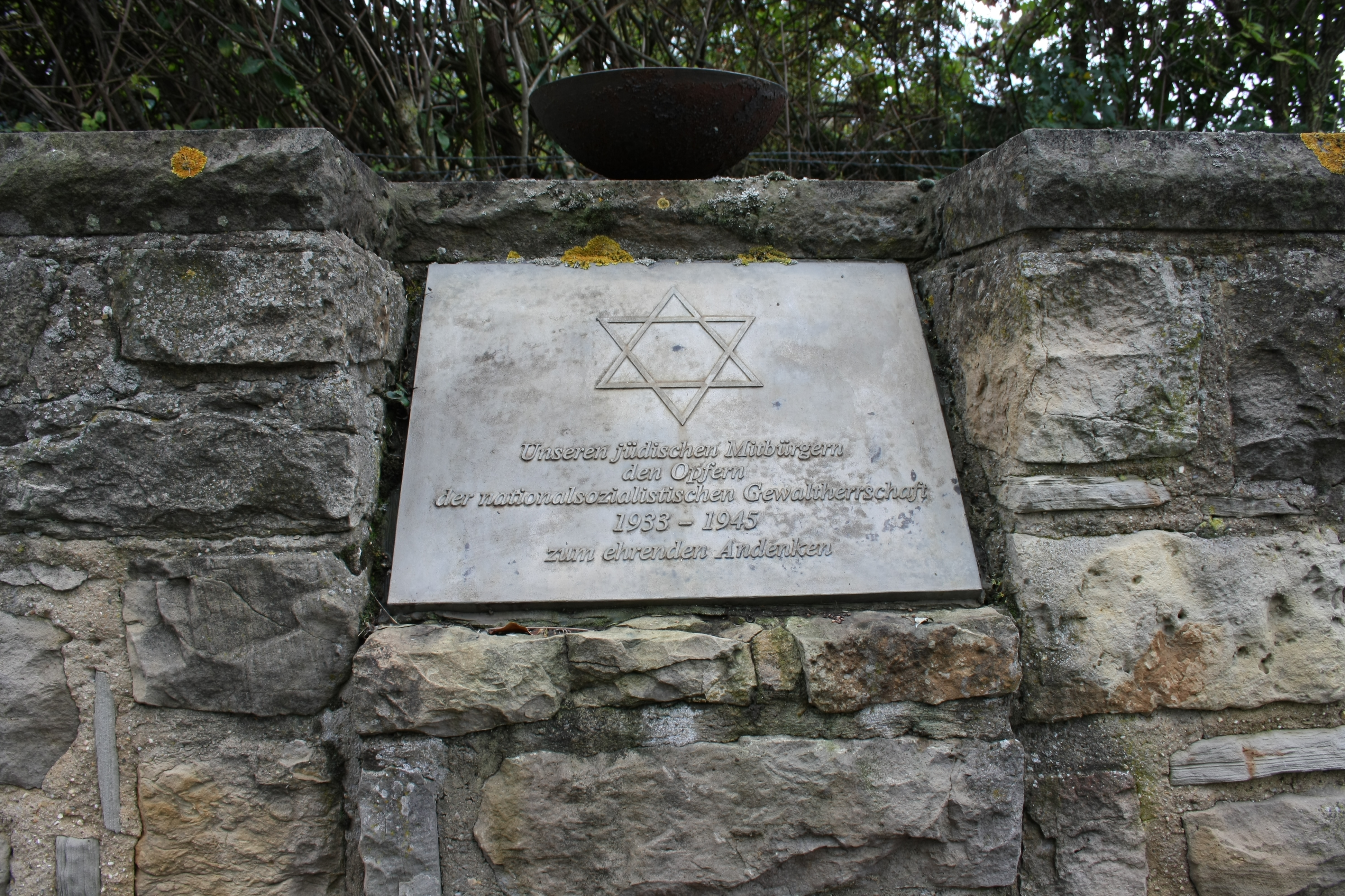 Gedenktafel für die ehemalige jüdische Gemeinde in Embken